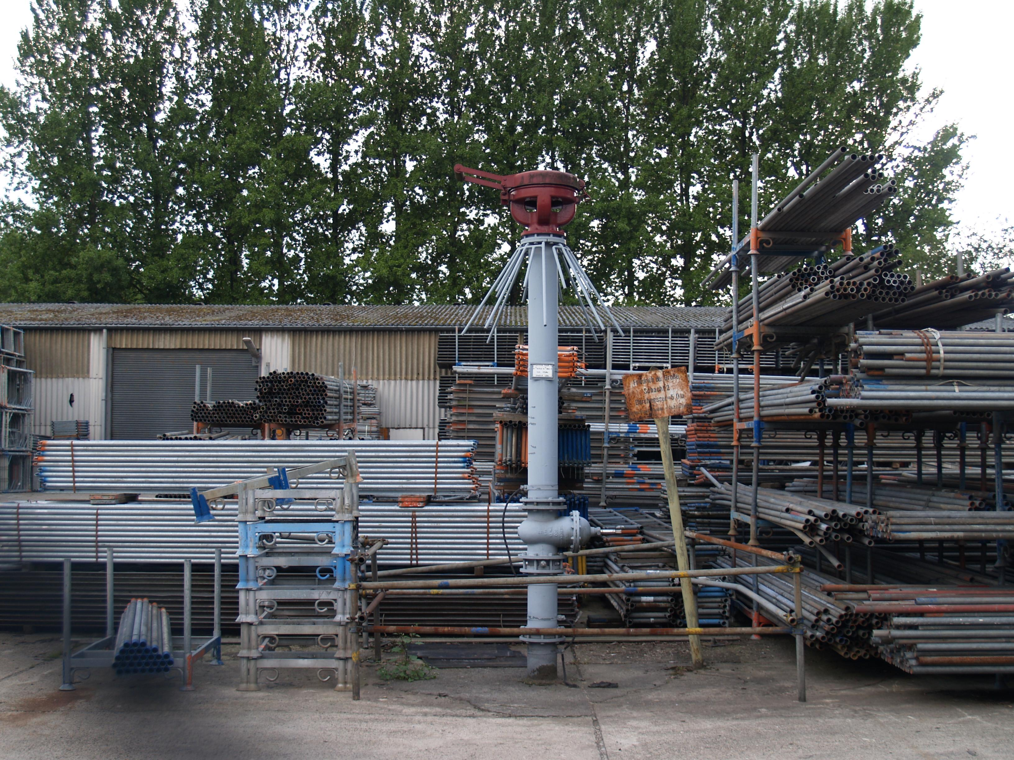 Zeche Friedrich der Große, Schacht 2 Standort